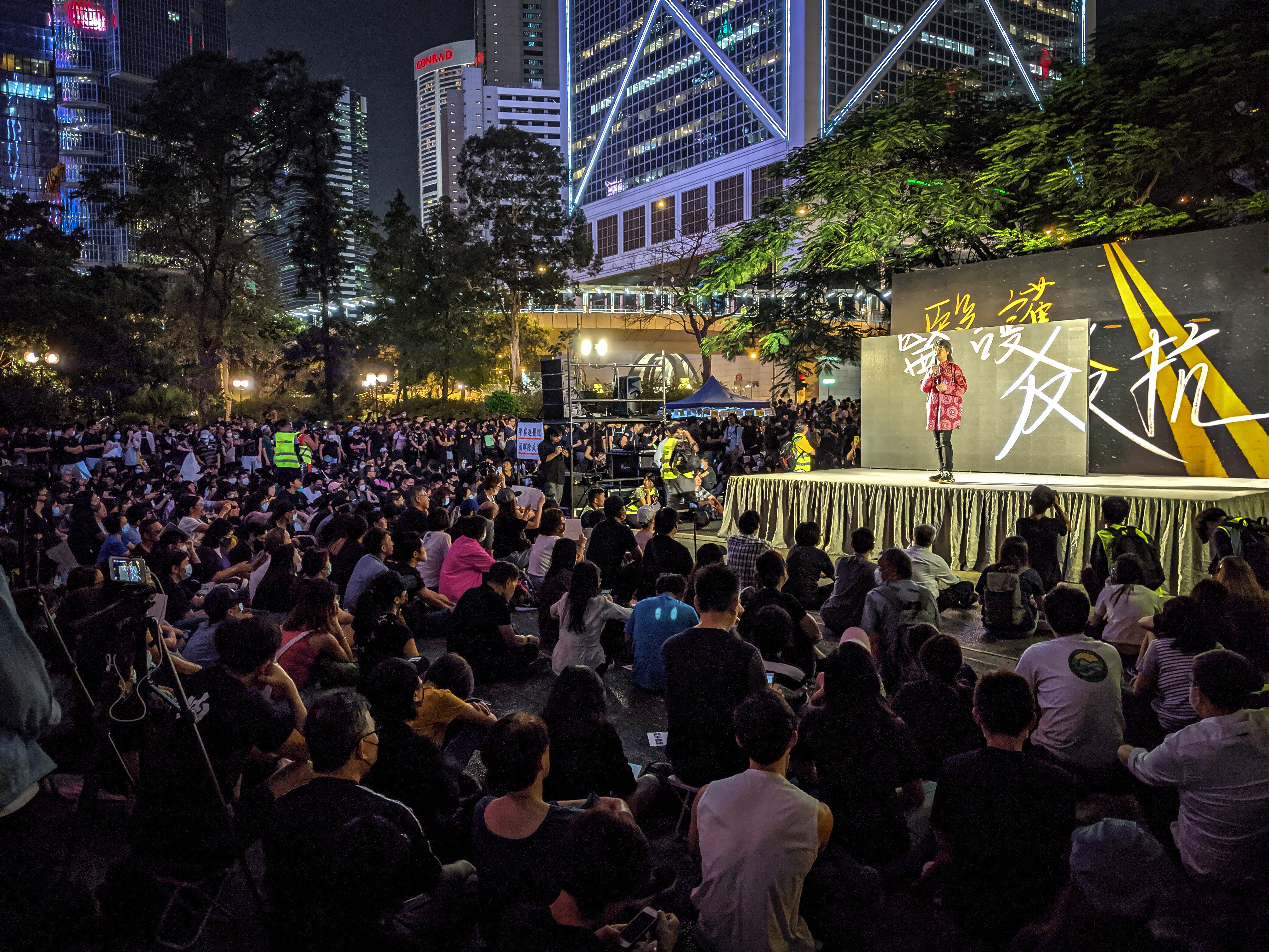 IMG_20191026_201118